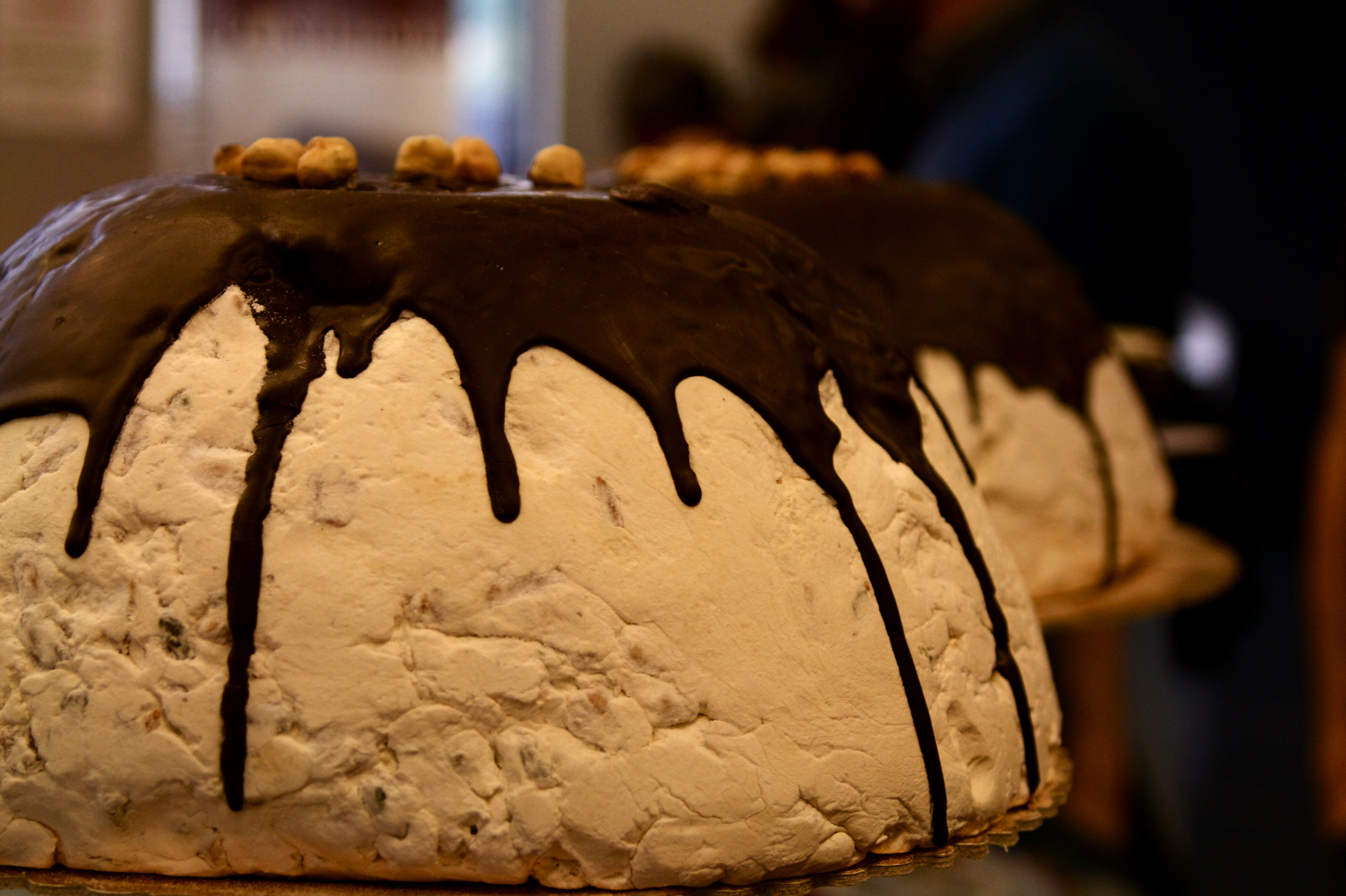 Zuccotto